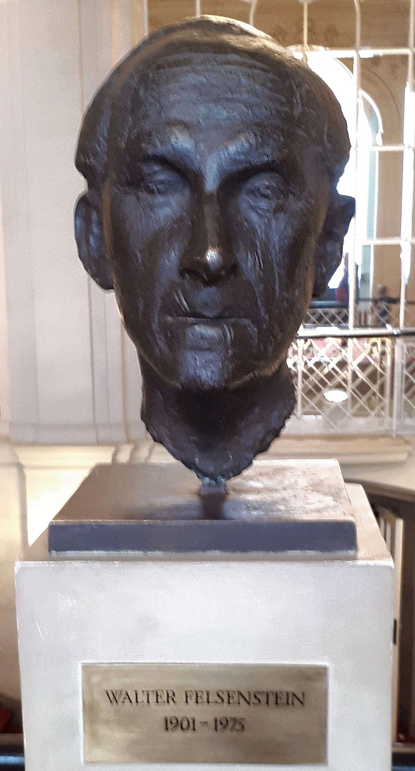 Büste von Walter Felsenstein in der Komischen Oper Berlin